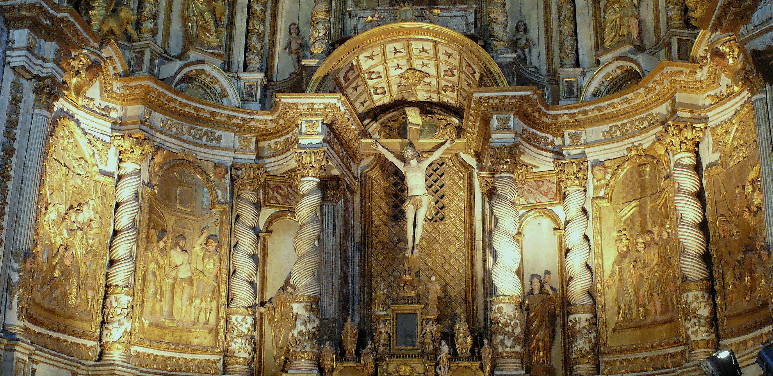 Villefranche-de-Rouergue - Chapelle des Pénitents-Noirs - Rétable